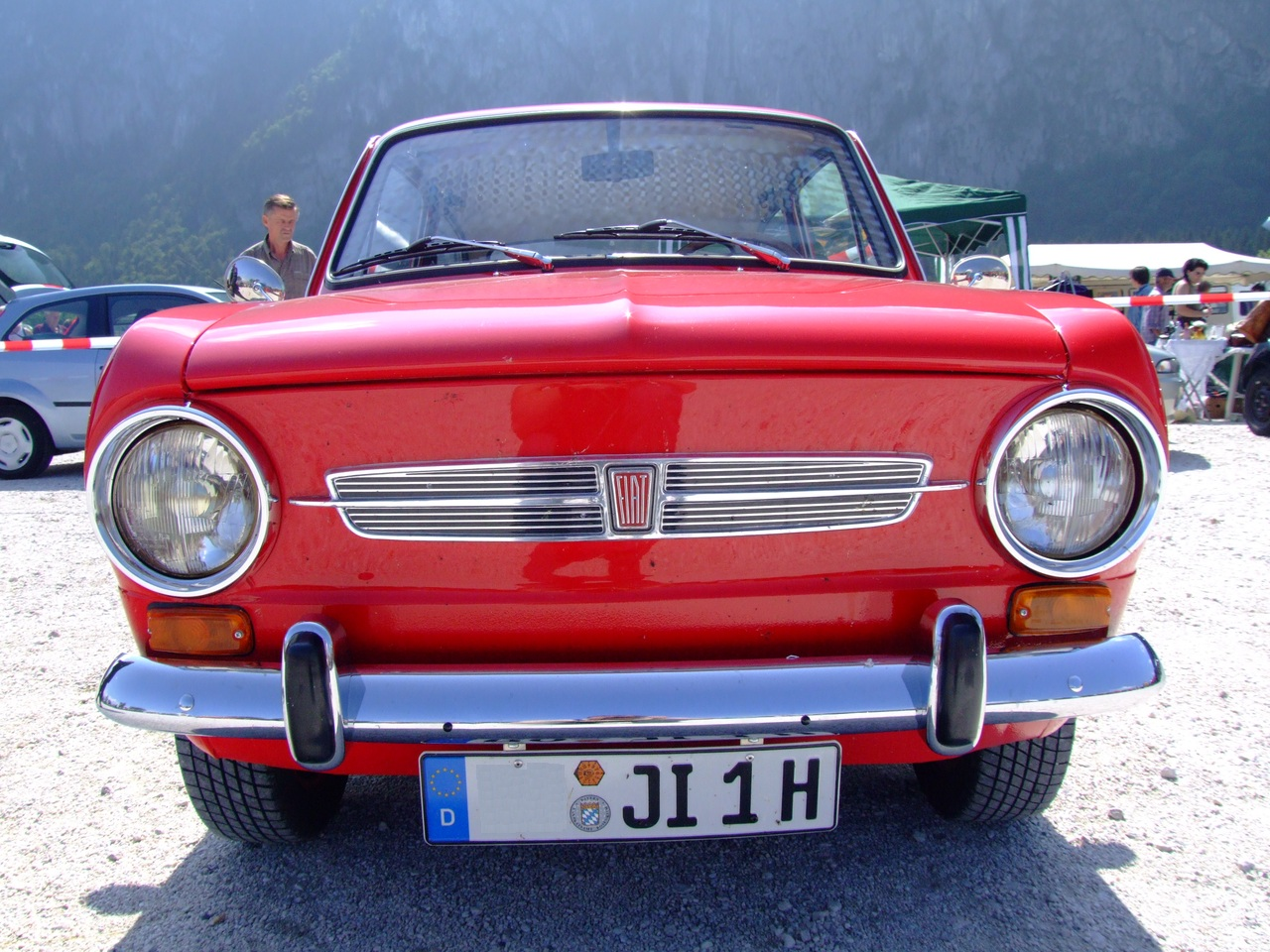 Quelle: selbst fotografiert, 06/2007 Fotograf: Späth Chr.